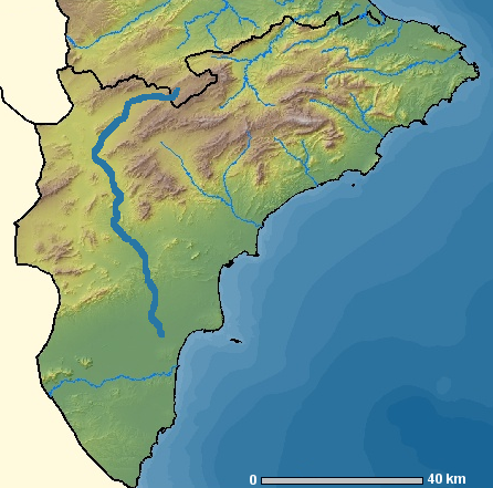 Localización del río Vinalopó respecto a la provincia de Alicante (España).